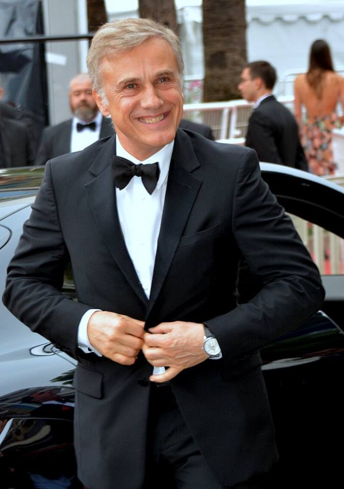 Christoph Waltz au festival de Cannes